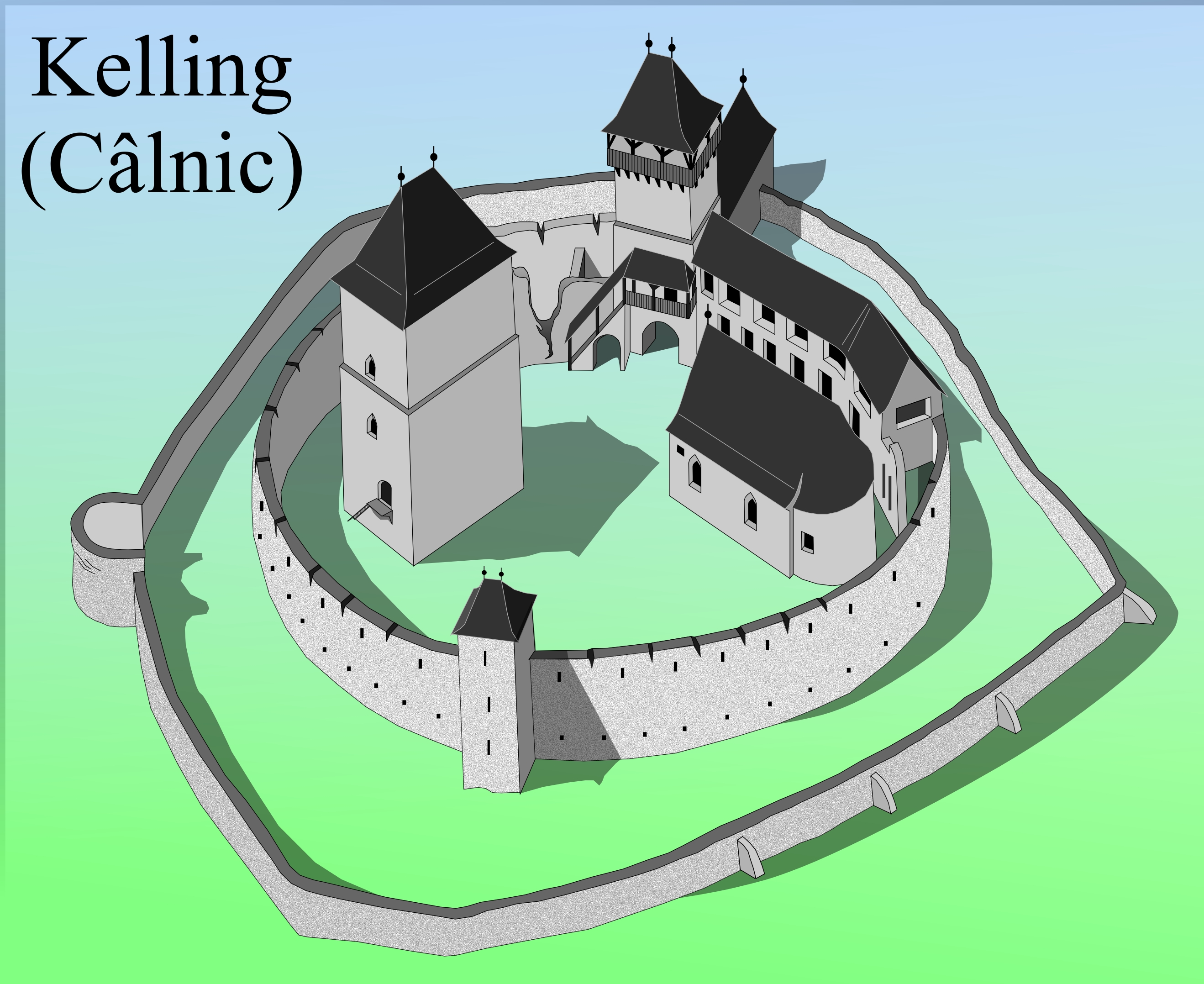 Cetatea de la Calnic vers3.